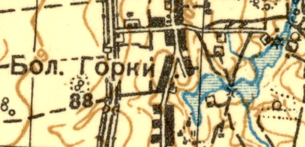 Топографическая карта Ленинградской области, квадрат О-35-12-Г (Ропша), деревня Большие Горки